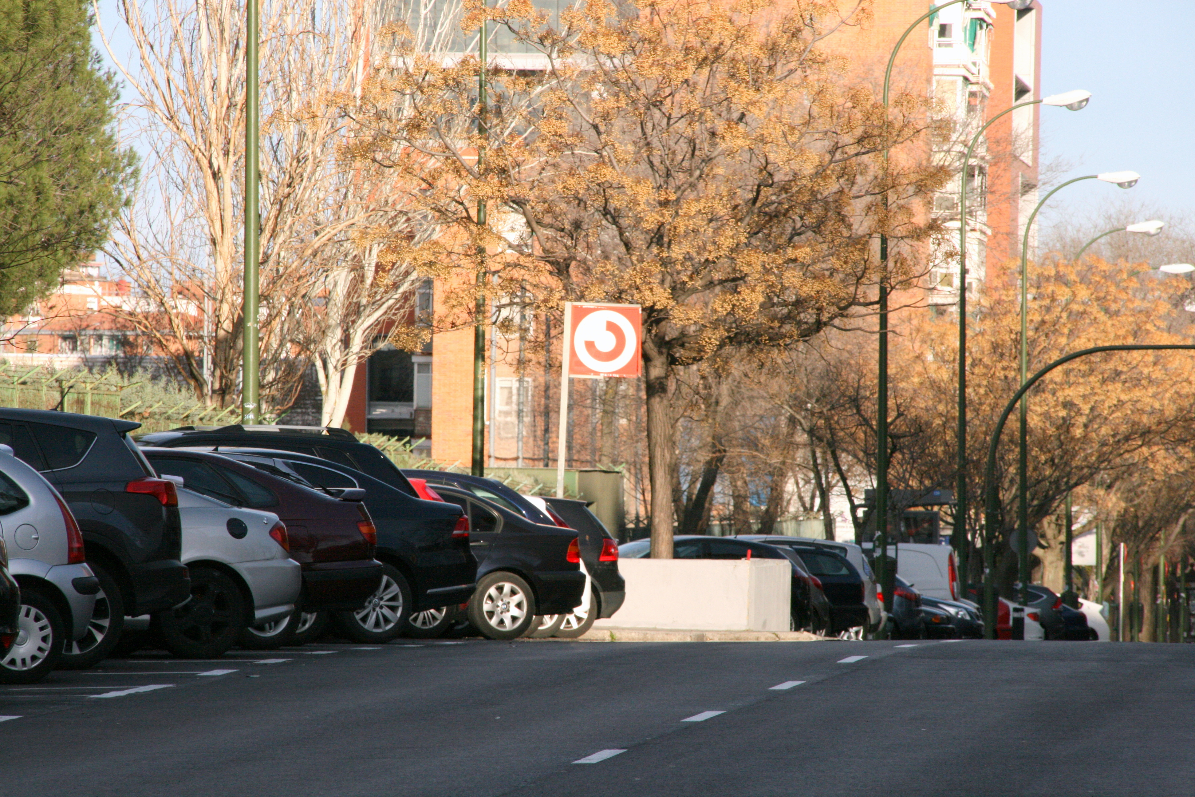 Acceso a la estación de Cercanías de Fanjul de Madrid. Acera de los pares de la avenida del General Fanjul